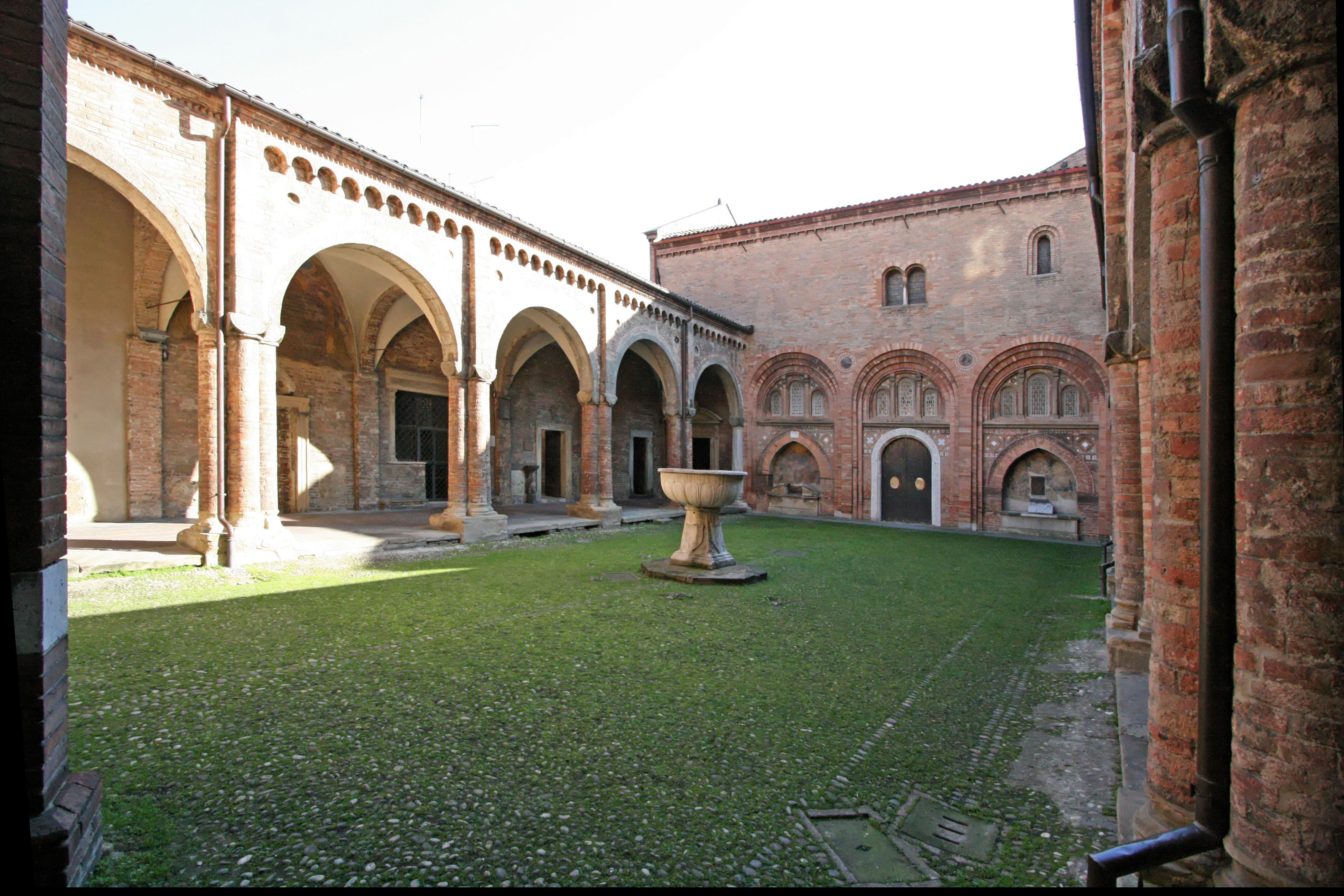 Sancta Jerusalem di Bologna. Seconda Chiesa: Chiesa dell'Atrio o Cortile di Pilato. Al centro il Catino di Pilato. Sullo sfondo la chiesa della SS. Trinità.